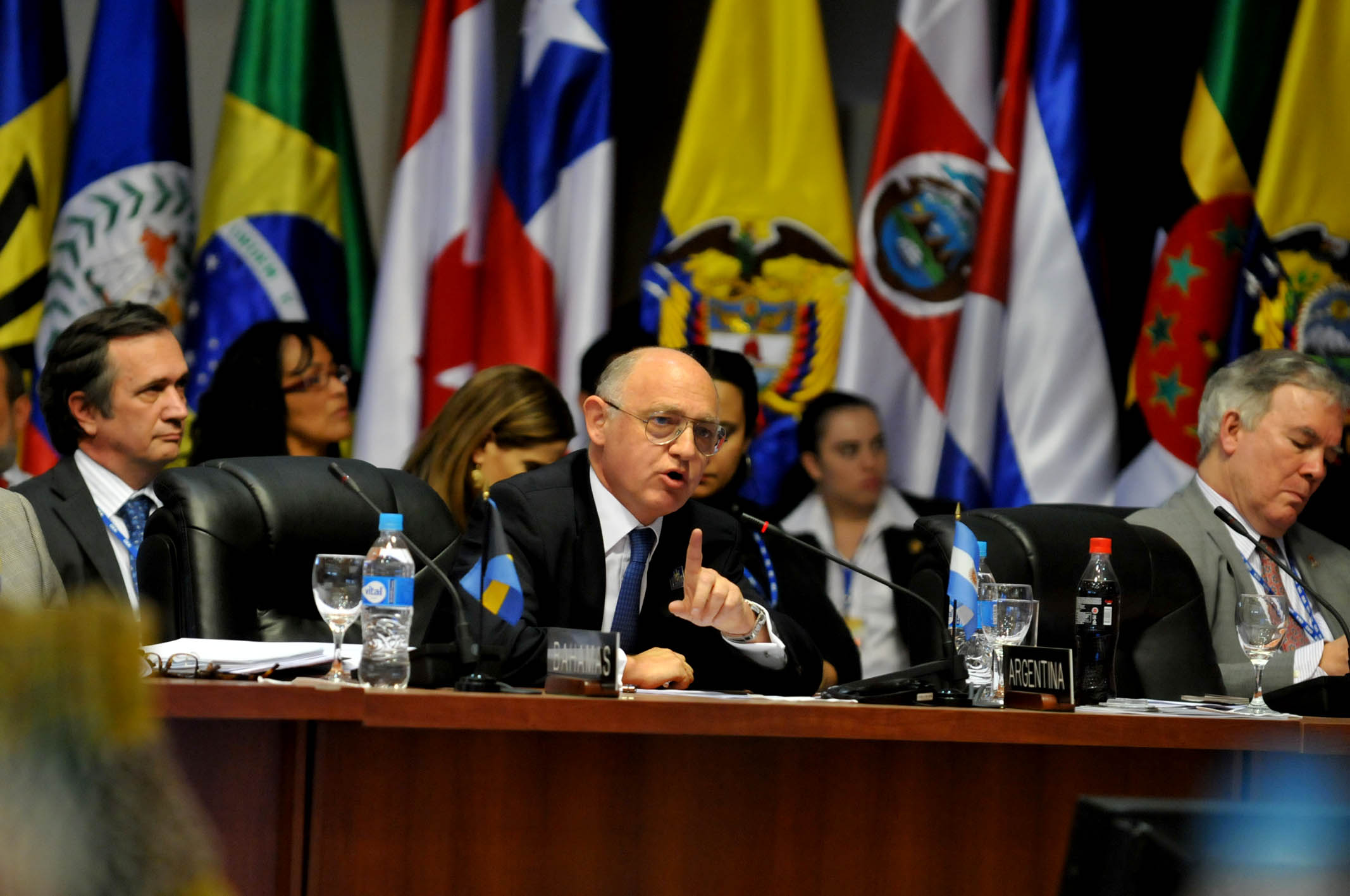 Cochabamba, Bolivia. Junio 5 de 2012. El Canciller Héctor Timerman expuso en la 42 Asamblea General de la OEA sobre la Cuestión Malvinas. Foto Roberto Daniel Gargiola